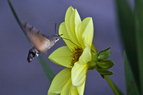 Опрашване на цвете